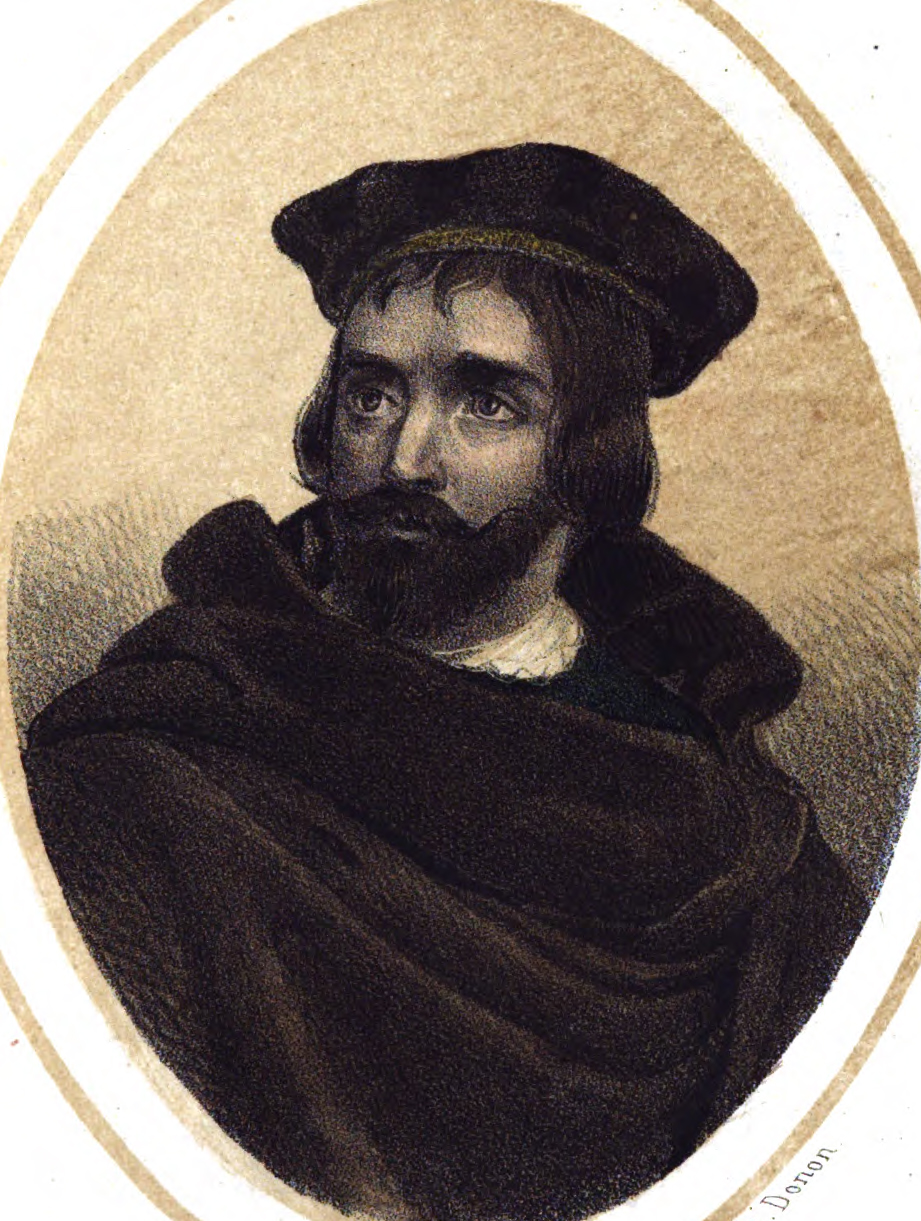 Juan Odon Colom.